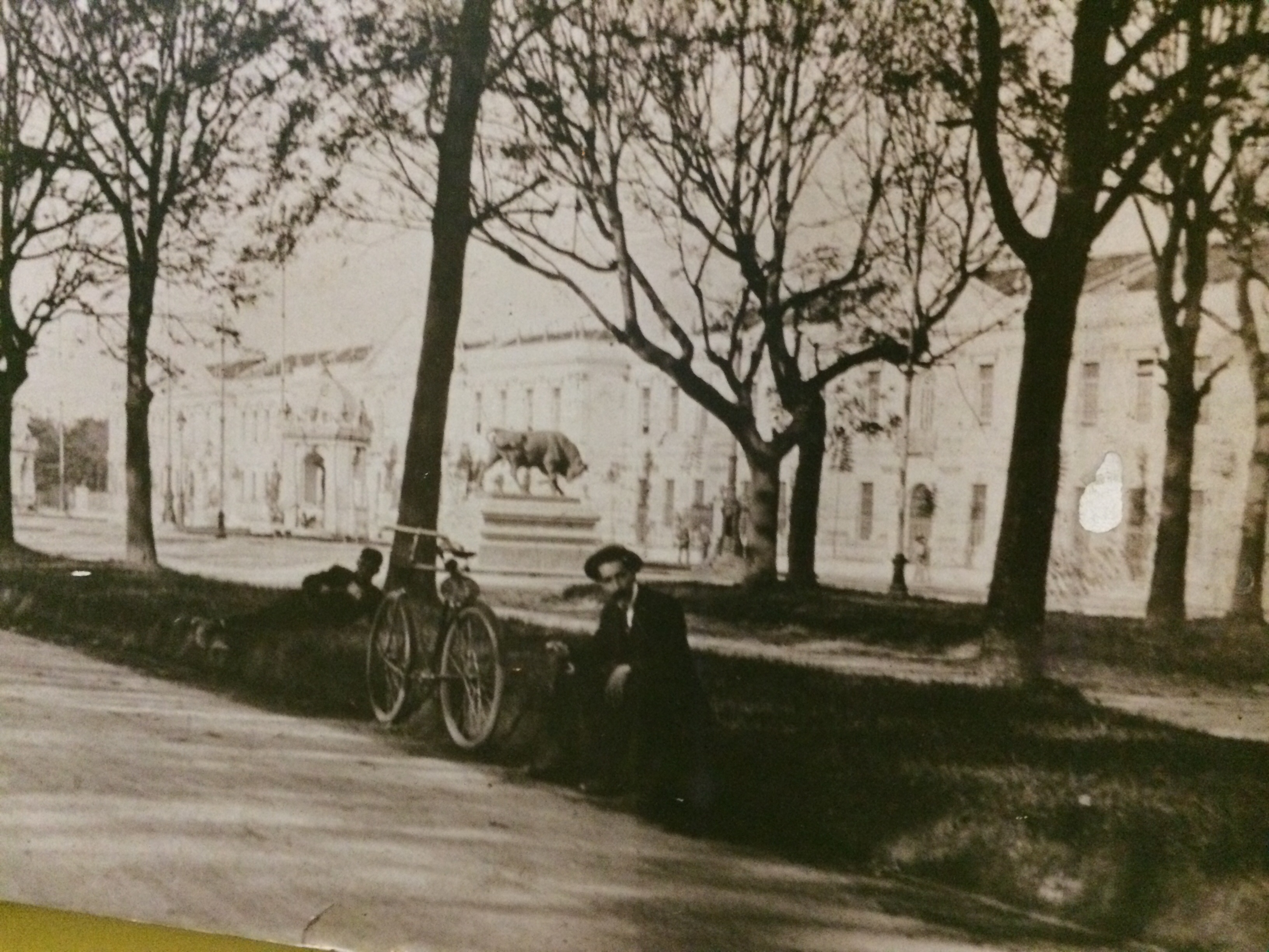 Boulevar30junio